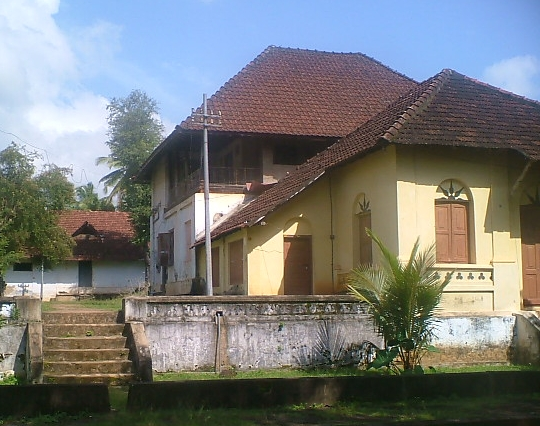 രാജ രവി വർമ്മ കിളിമാനൂരിൽ ചിത്രം വരക്കാൻ ഉപയോഗിച്ചിരുന്ന മുറി. (അദ്ദെഹം മരിച്ചതും ഇവിടെ തന്നെയാണ്)